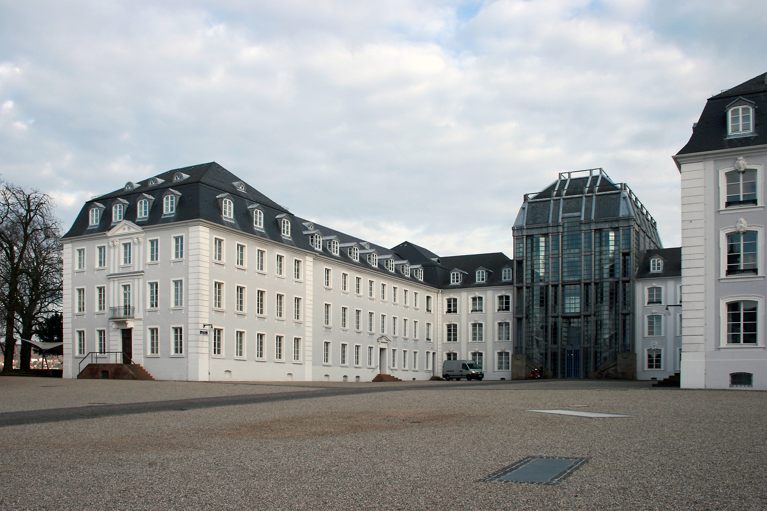 Saarbrücker Schloss - Hauptansicht